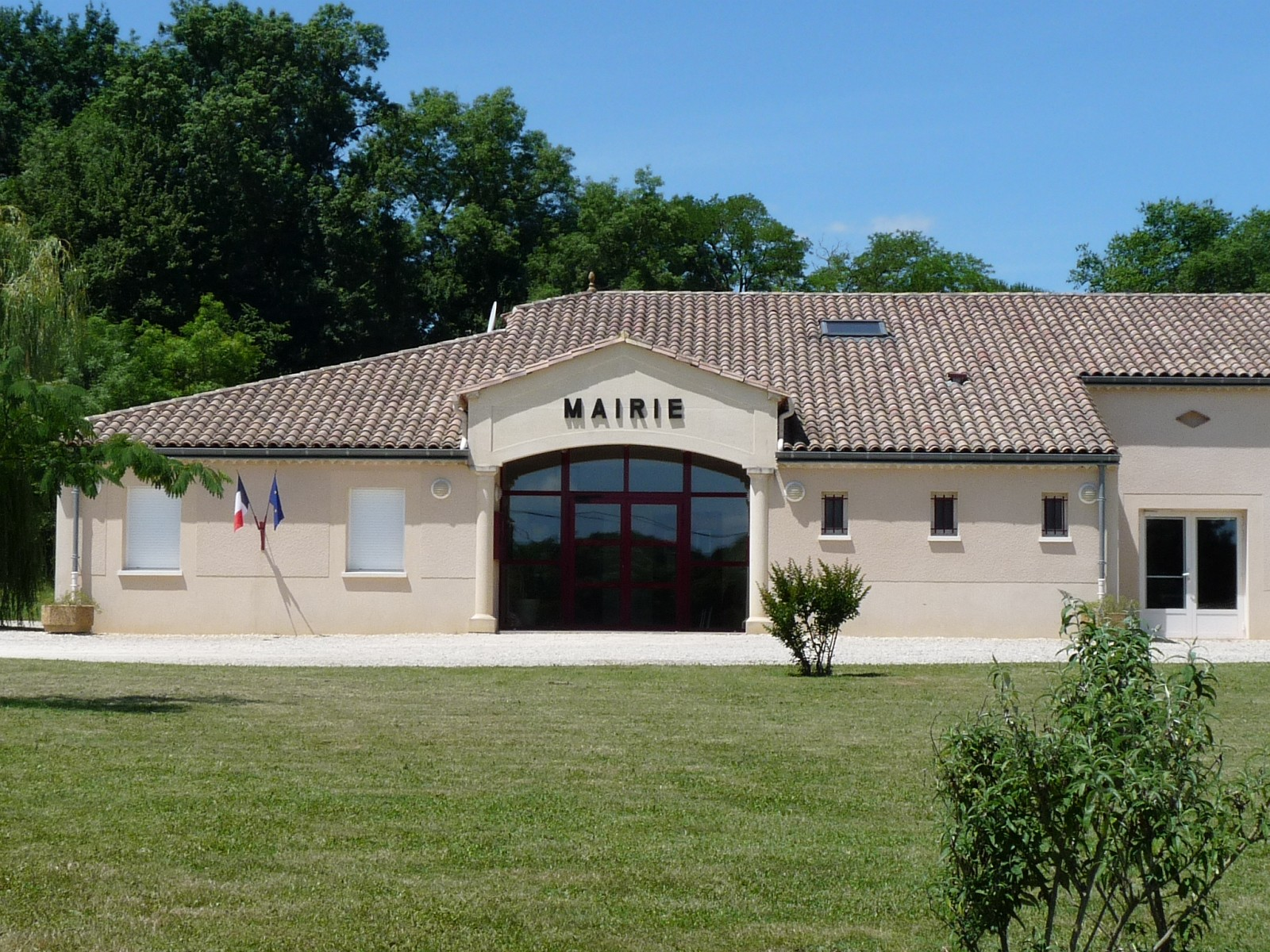 Mairie de Ligueux, Gironde, France